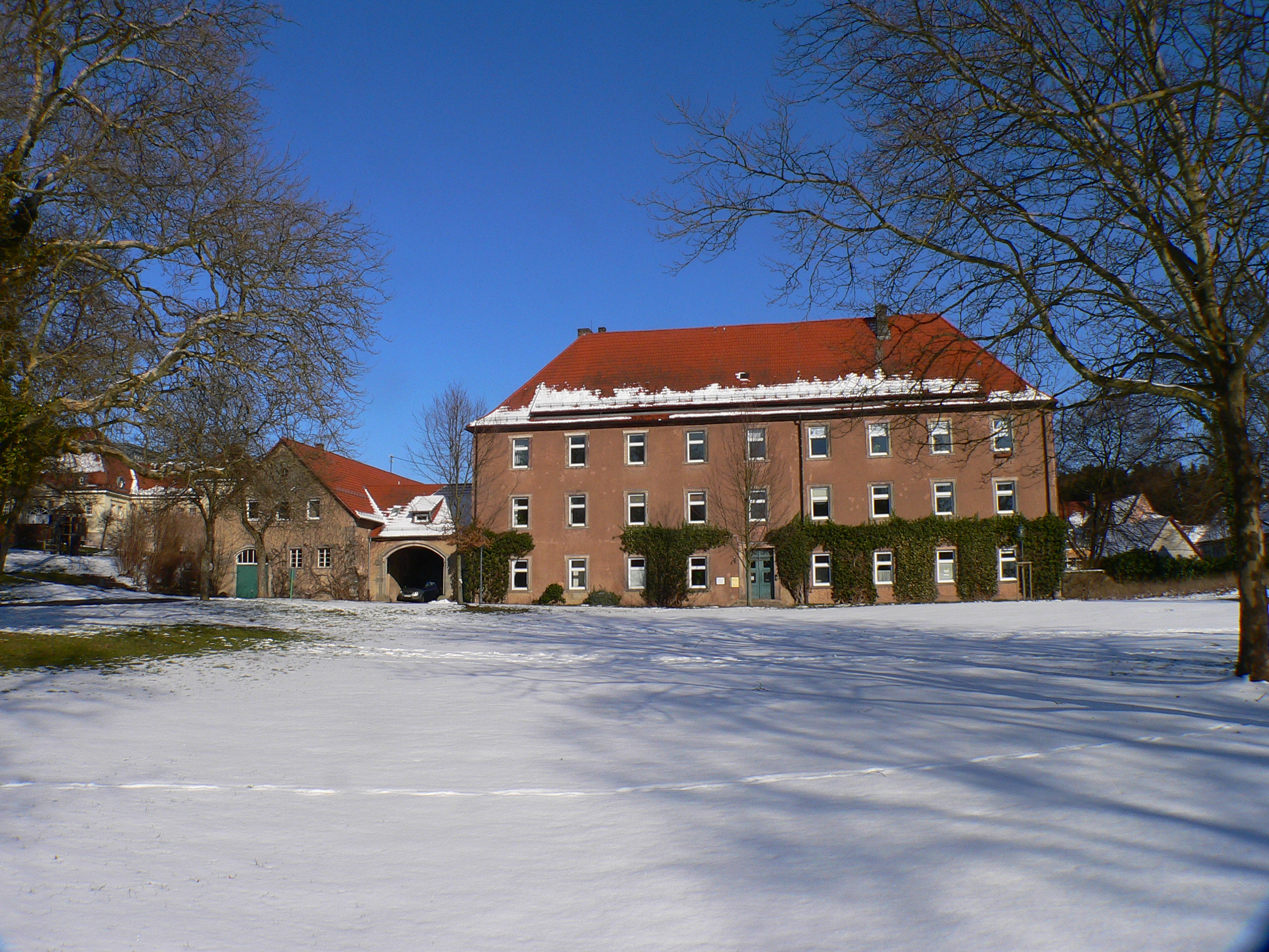 Mittleres Schloss Gersfeld in Gersfeld, Landkreis Fulda, Hessen.